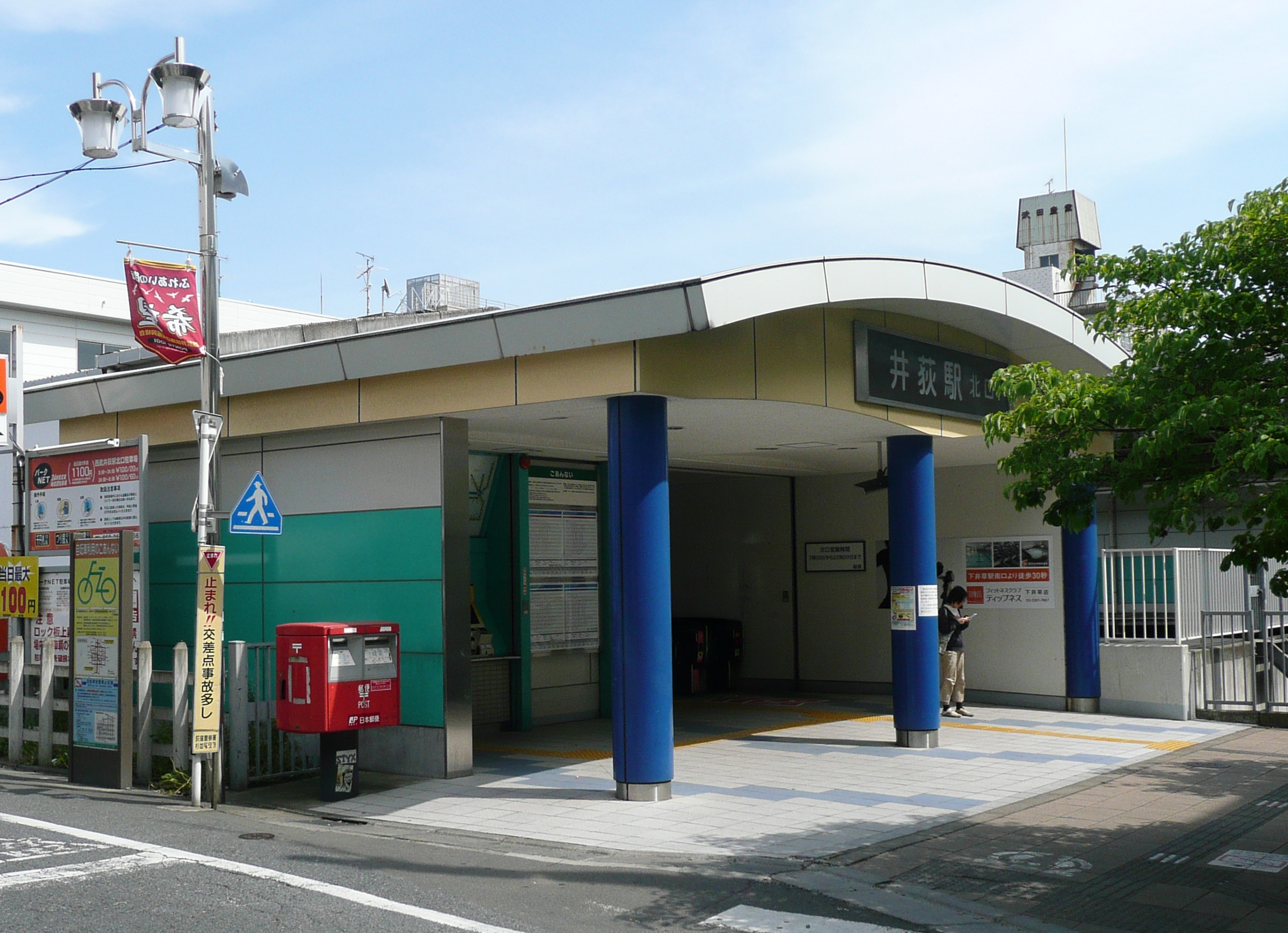 井荻駅北口